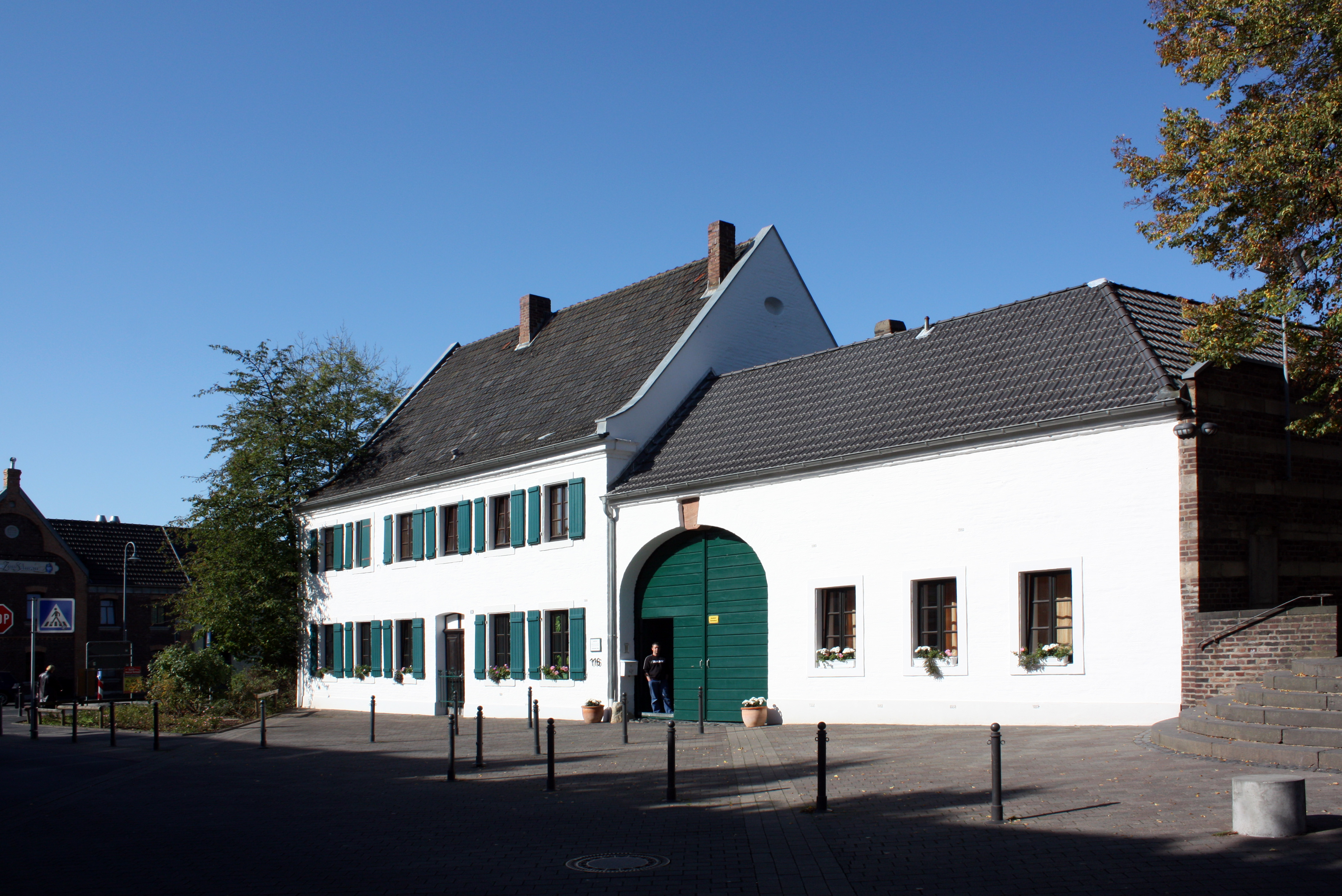 Erftstadt-Liblar, ehemaliger Fronhof des Stiftes Dietkirchen in Bonn